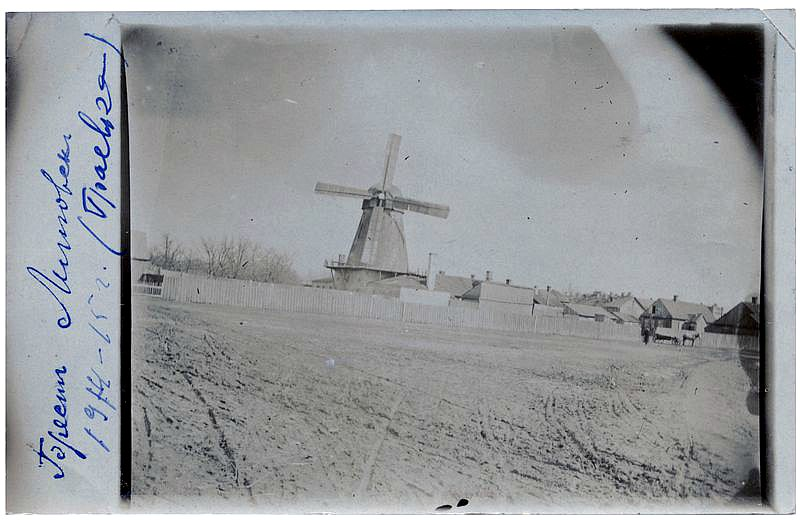 Беларуская (тарашкевіца): Берасьце (Bieraście), Граеўка (Hrajeŭka). Вятрак